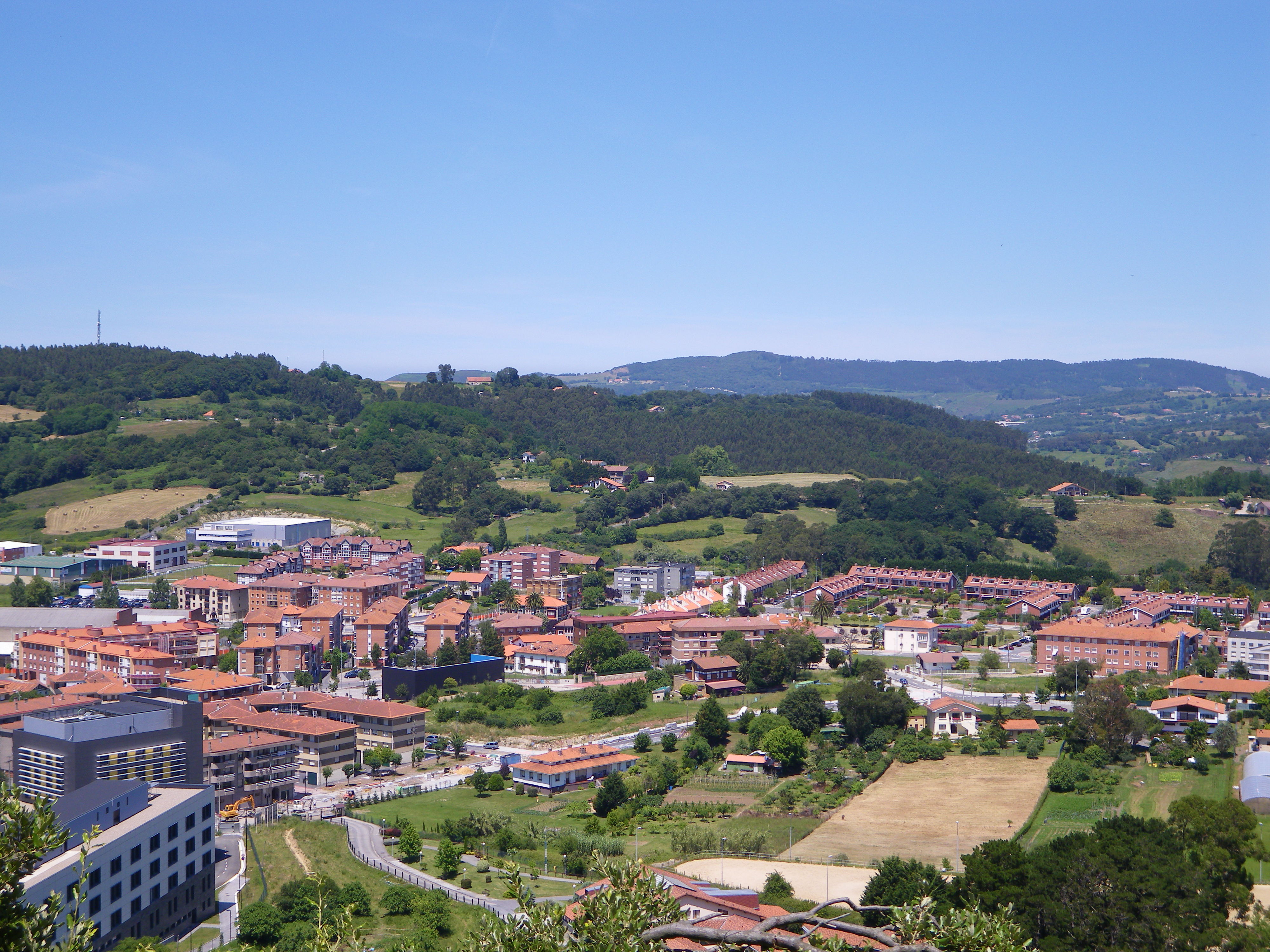 Bizkaiko Urduliz herriaren ikuspegia, Santa Marina atxa deritzon mendi magaletik.